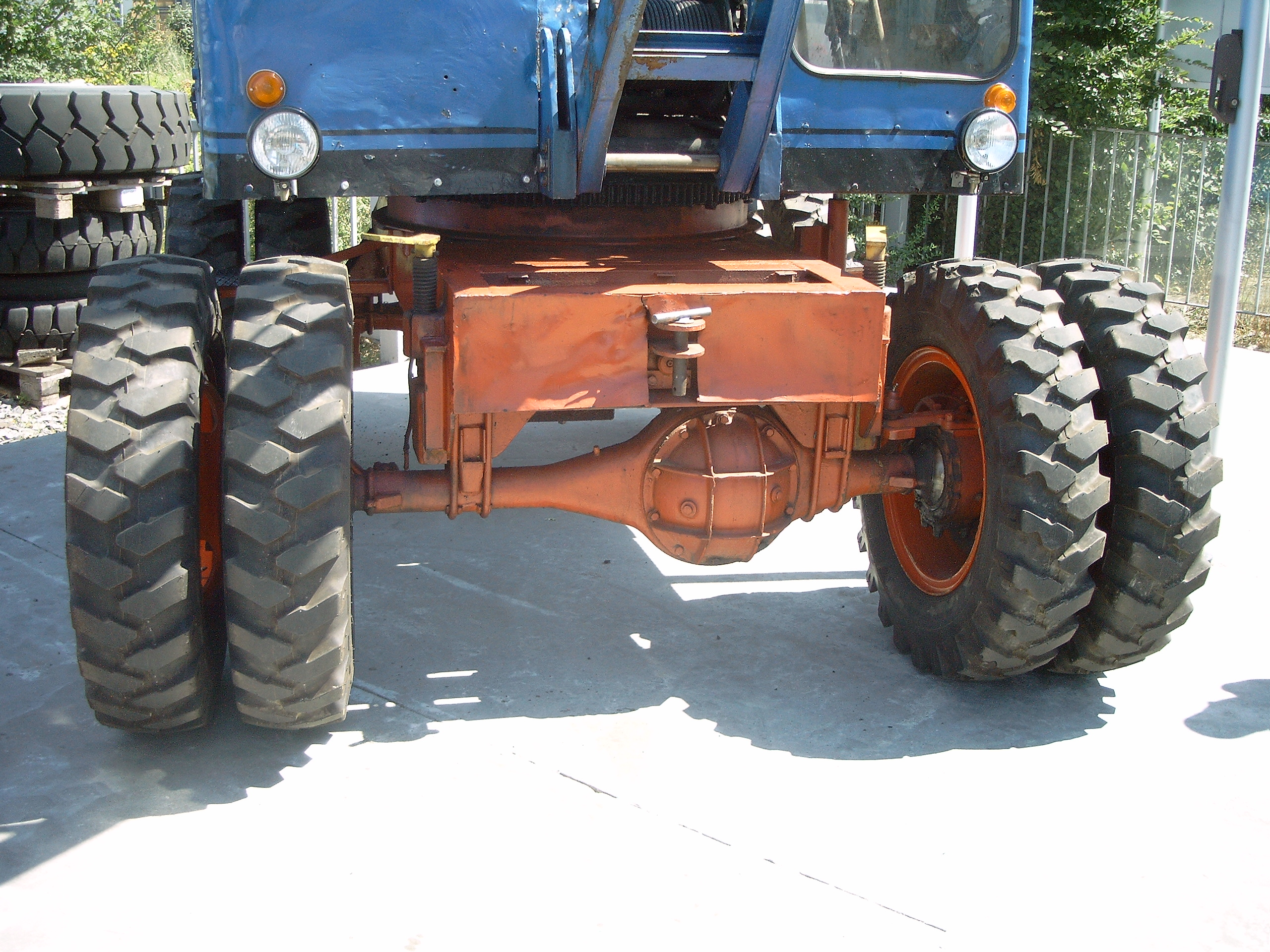 Fuchs-Bagger beim 50. Jubiläum des Herstellers in Bad Schönborn